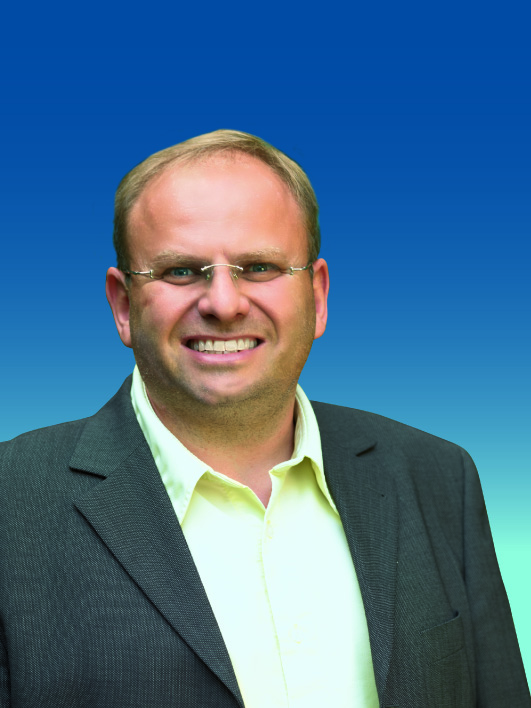 Arnd Czapek